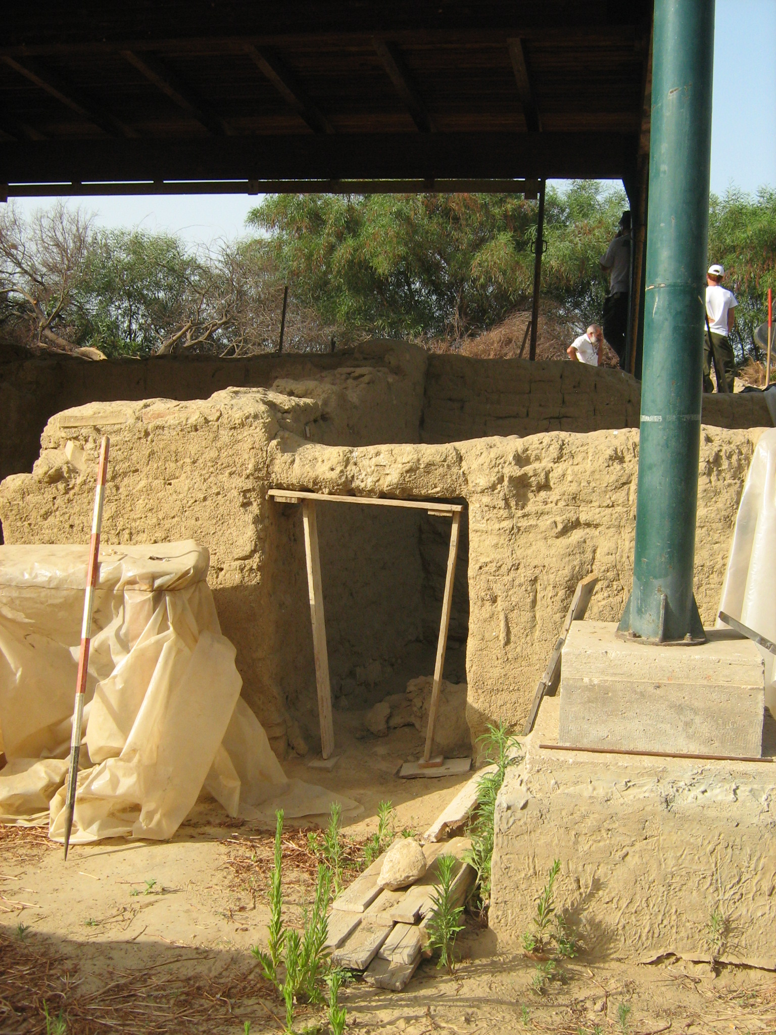 Porta di epoca Arcaica (VI secolo a.C.) Licensing Categoria:Gela